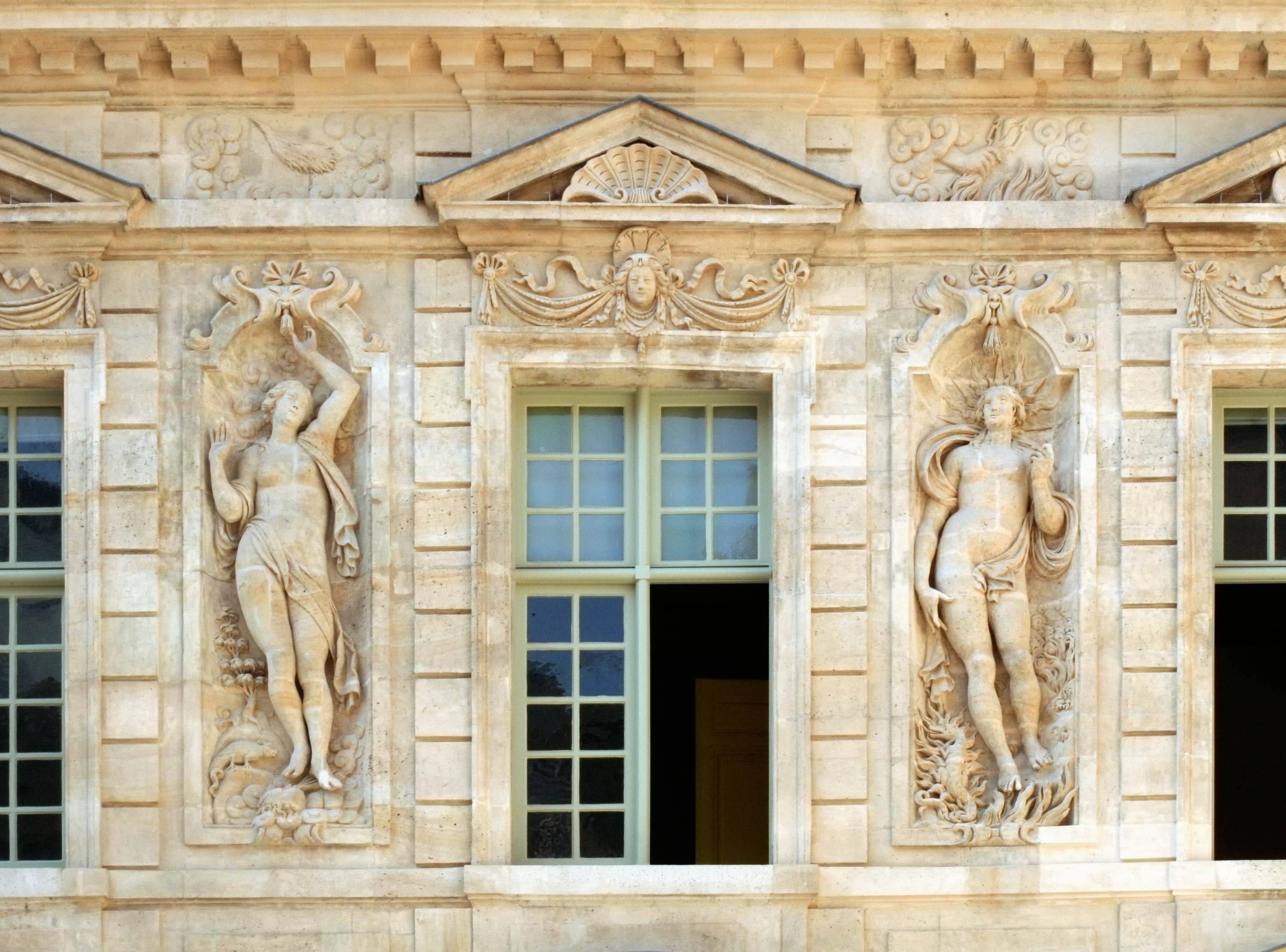 Bas relief de Jean Goujon sur la façade sur cour de l'hôtel de Sully, Paris. À gauche le Printemps à droite l'Été.